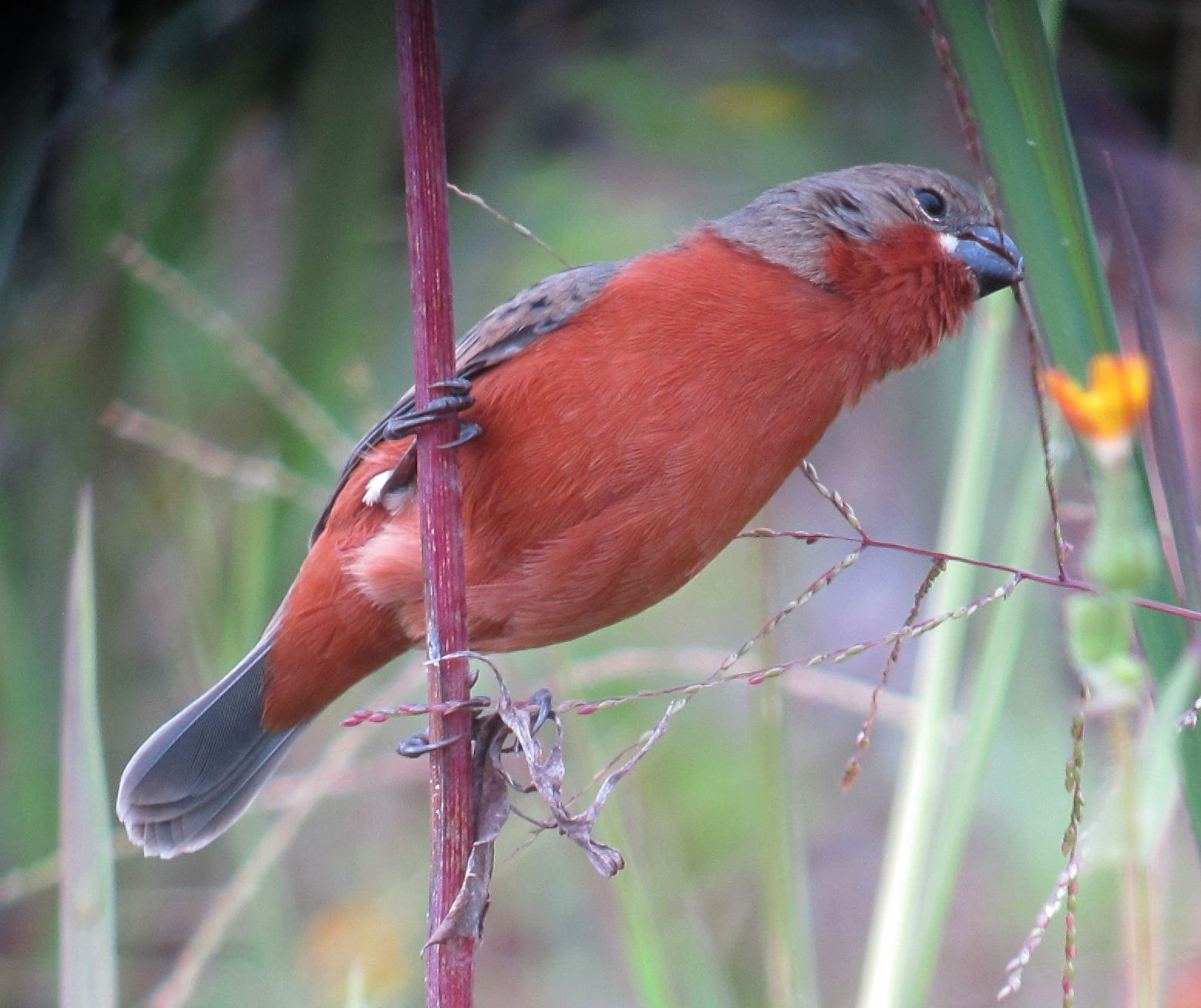 Rionegro, Antioquia, Colombia